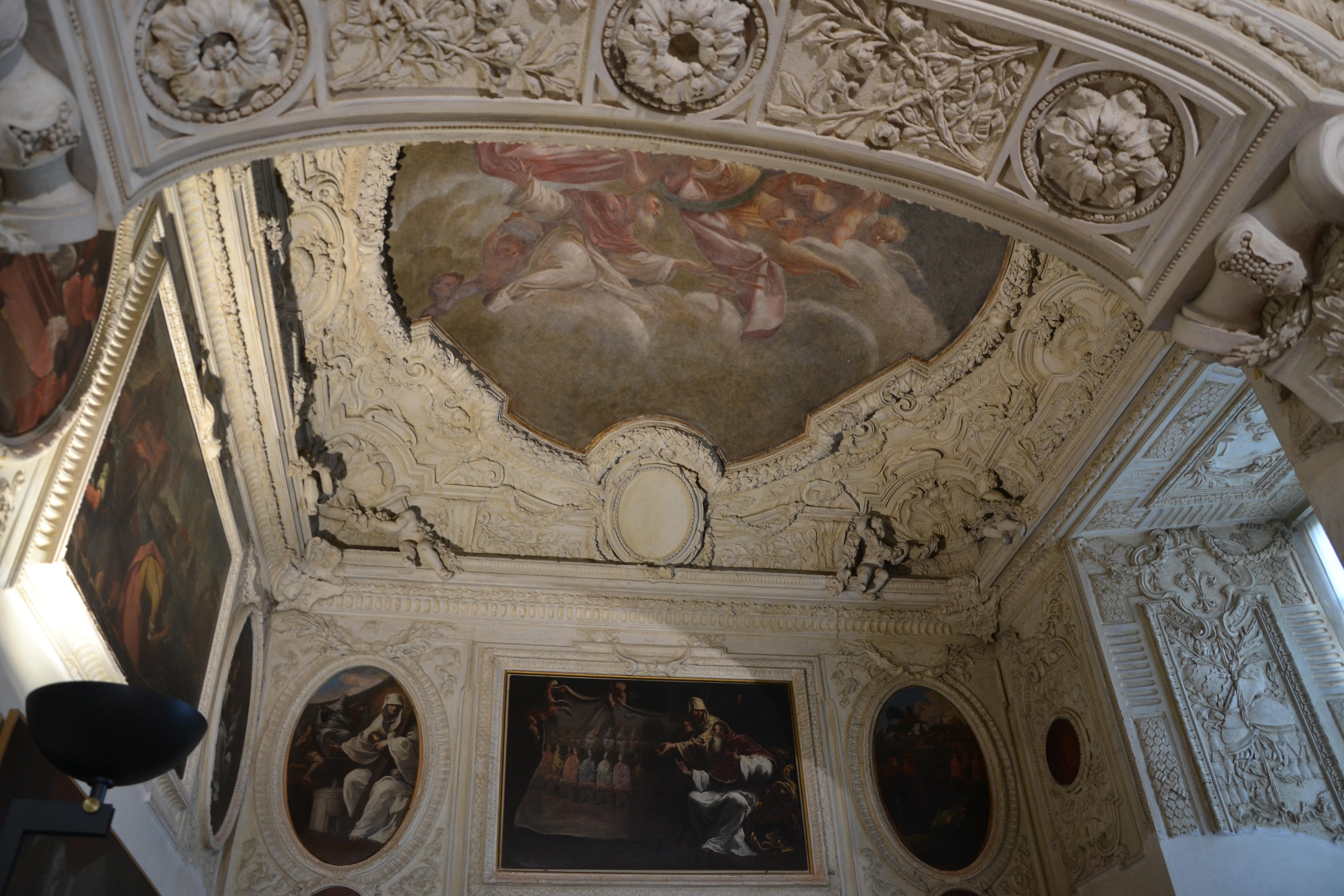 Palazzo Farnese - appartamento stuccato di Ranuccio II (1685), anticamera del Duca This is a photo of a monument which is part of cultural heritage of Italy.